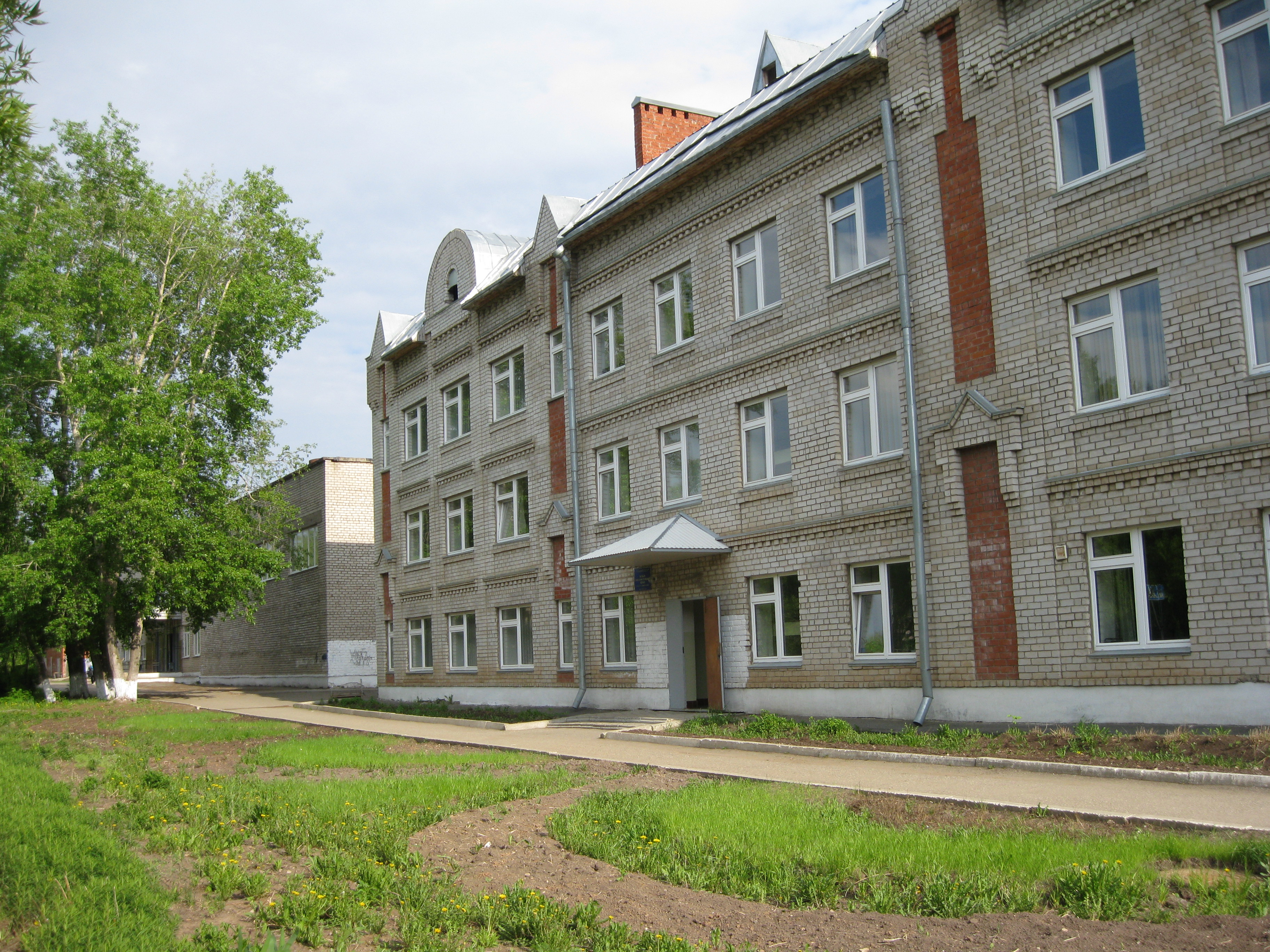 Здание нового образовательного центра при средней общеобразовательной школе №2 города Чернушка